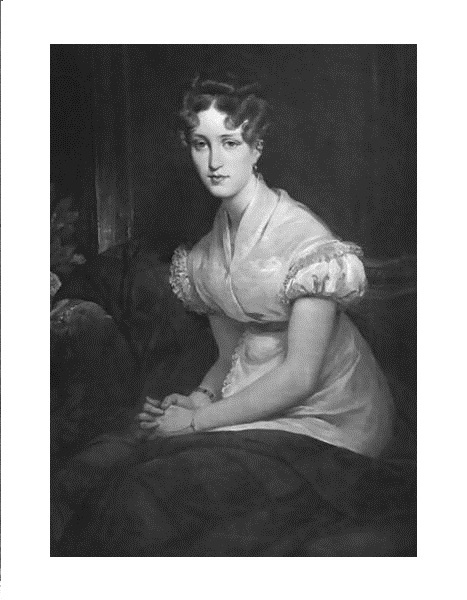 Louise-Cordelia Greffulhe de Castellane (1796-1847), incisione, collezione privata